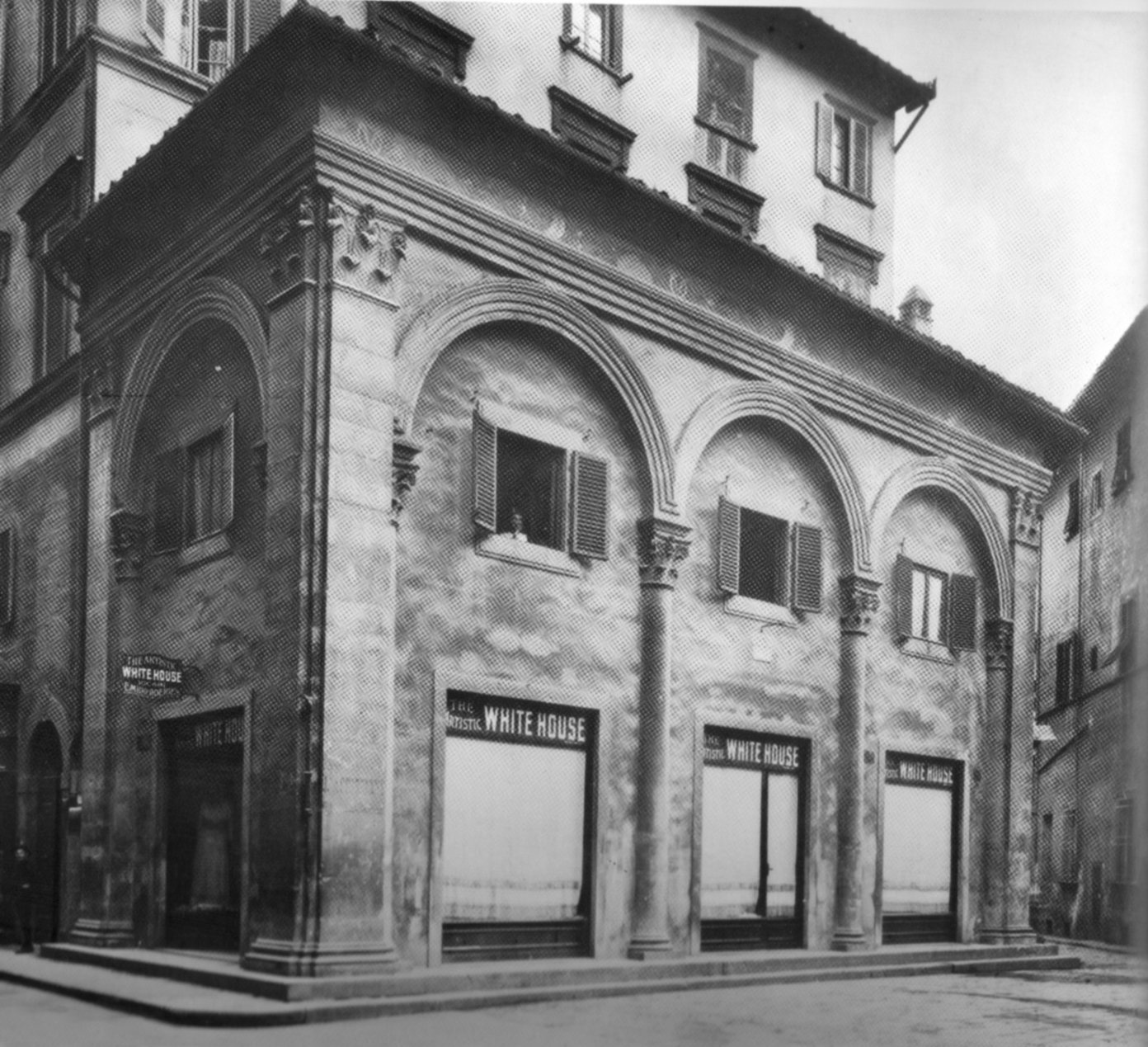 Loggia rucellai 1880